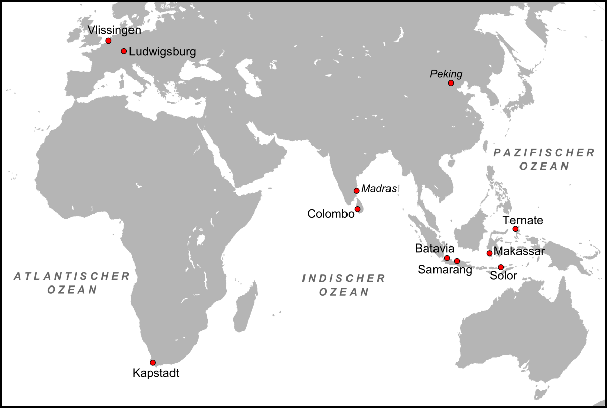 Karte der Haupt-Stützpunkte und -Einsatzorte des Kapregiments im 18. Jahrhundert